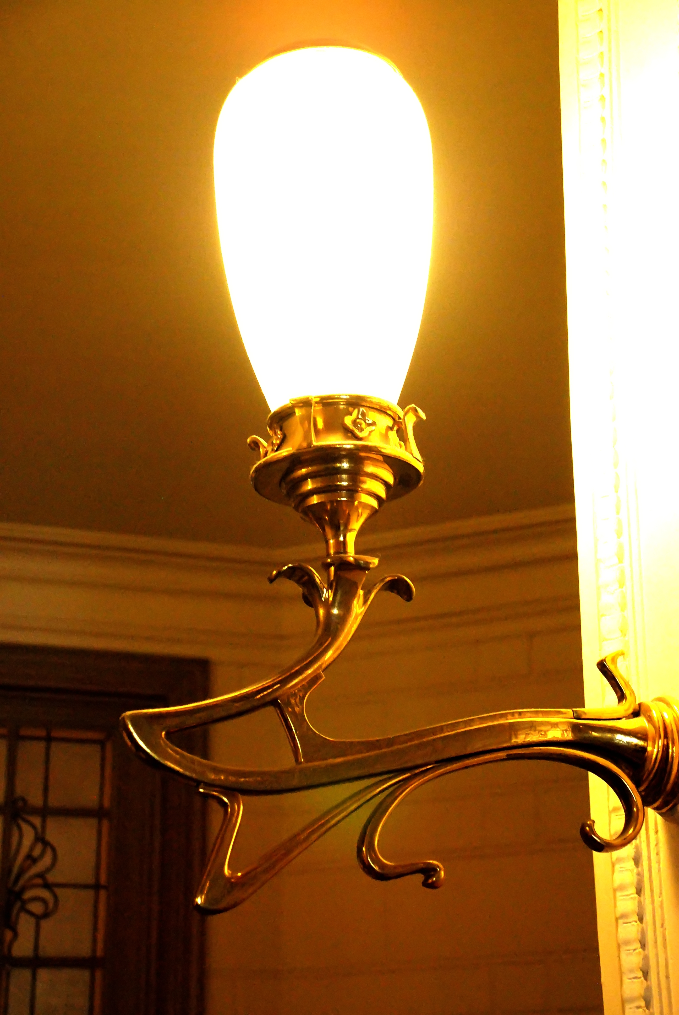 Applique art nouveau, Hötel Gresham, Bruxelles, Belgique.